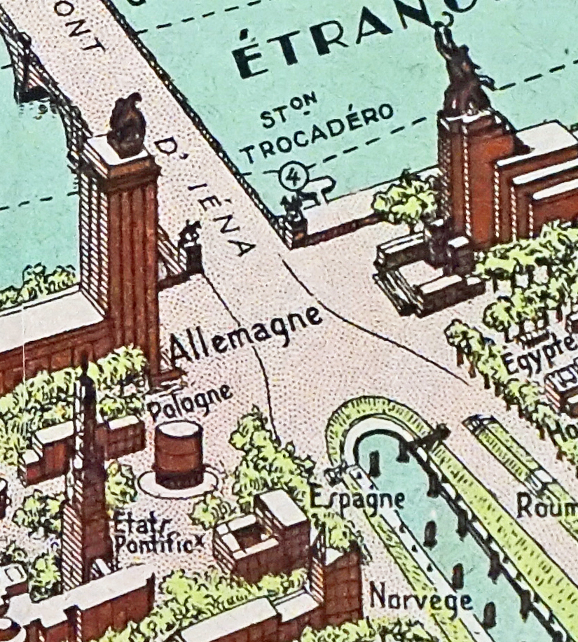 Détail de la carte de l'exposition de 1937 (zone du Trocadéro et de la Tour Eiffel) Le palais de Tokyo est construit pour accueillir le musée d'art moderne de la ville de Paris (toujours en place) et le Musée national d'art moderne (qui a déménagé au centre G. Pompidou). Le Palais d'Iéna, (pavillon des travaux publics, aujourd'hui conseil économique, social et environnemental) est construit par Auguste Perret, mais ne sera terminé qu'en 1946. Sur la carte, il est représenté terminé alors qu'en 1937 une seule aile a été édifiée. Article de Wikipedia sur l'exposition de 1937 Site de l'exposition Robert Delaunay au musée national d'art moderne (Centre Georges Pompidou)